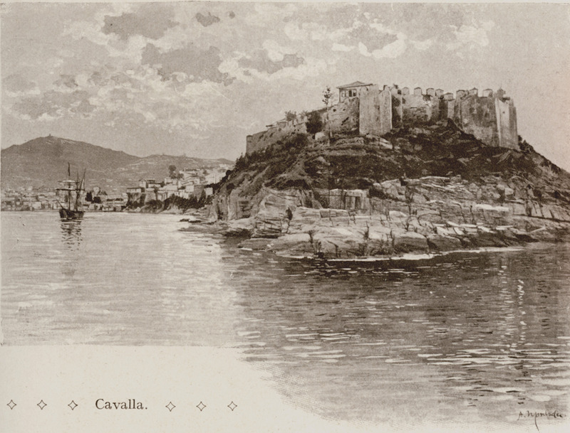 Cavalla - Van Den Brule Alfred - 1907